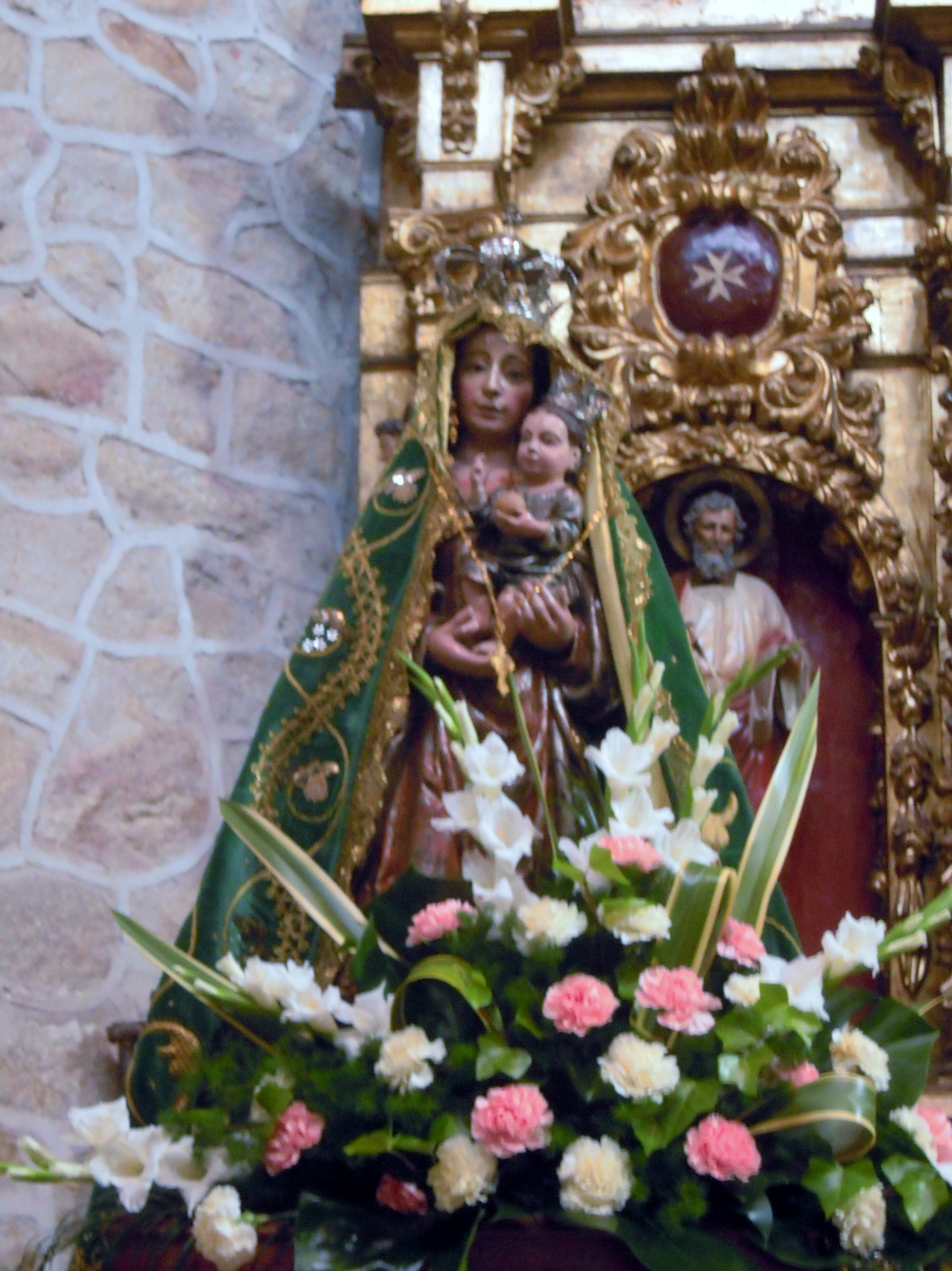 Virgen de la Piedad - El Torno